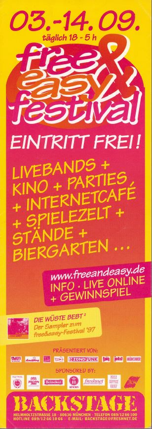 Screenshot eines alten Flyers von 1998 vom Free & Easy Festival